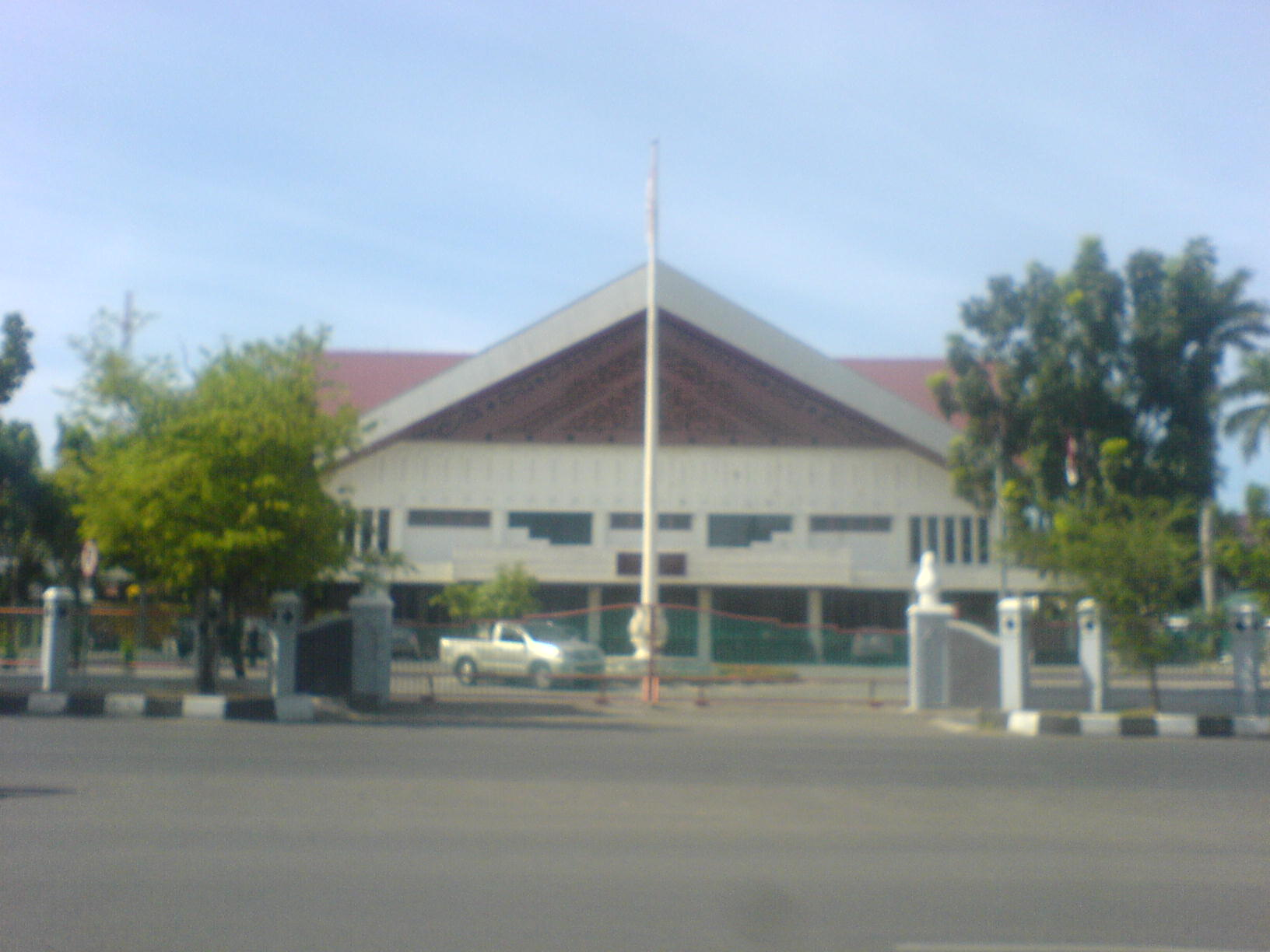 Dewan Perwakilan Rakyat Aceh